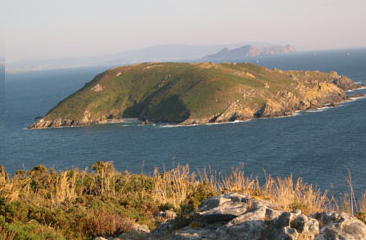 Isla de Onza, en el centro. Abajo, suelo de la isla de Ons. Al fondo, Islas Cíes